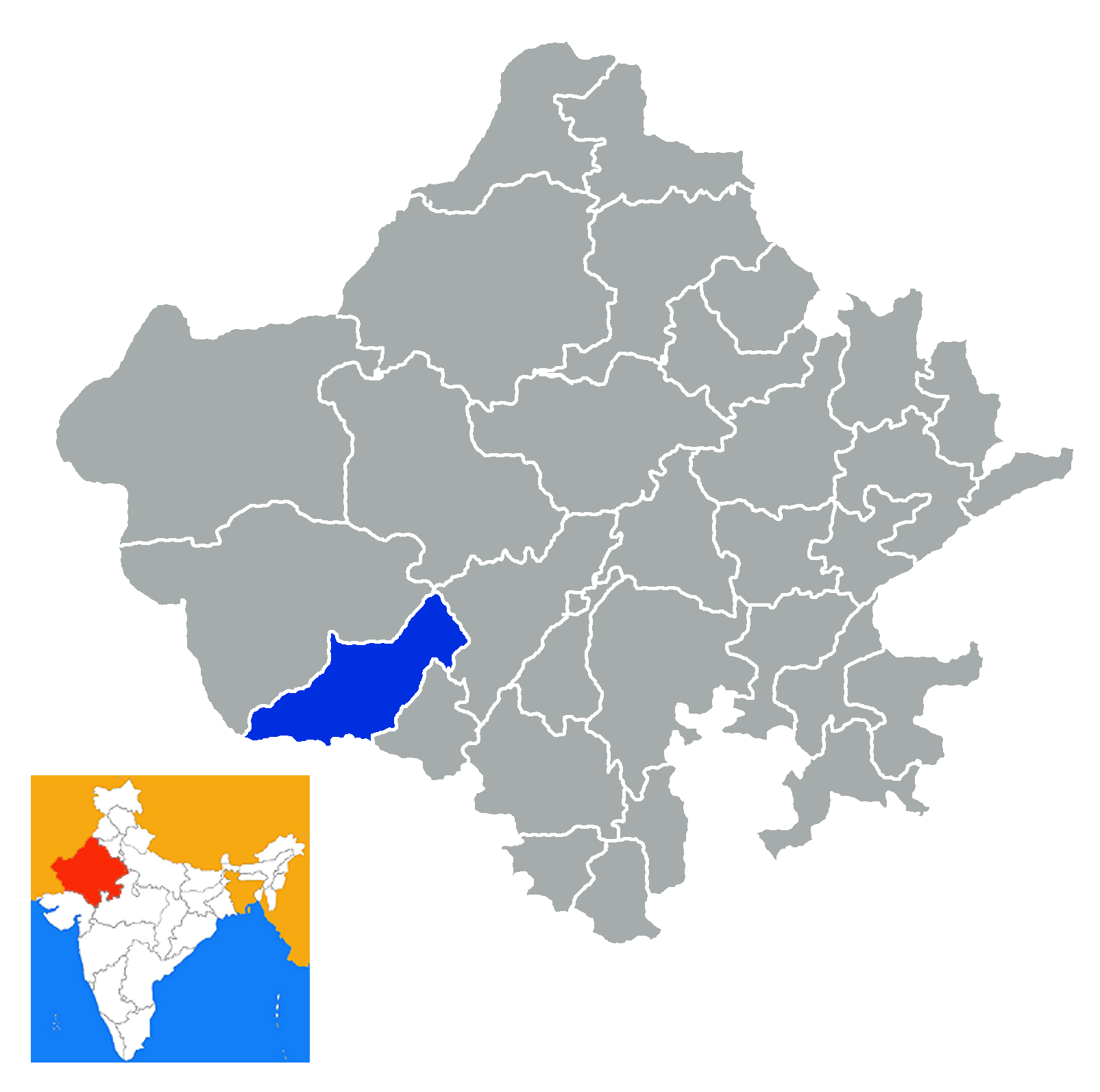 Distrito de Jalor Rajastan India